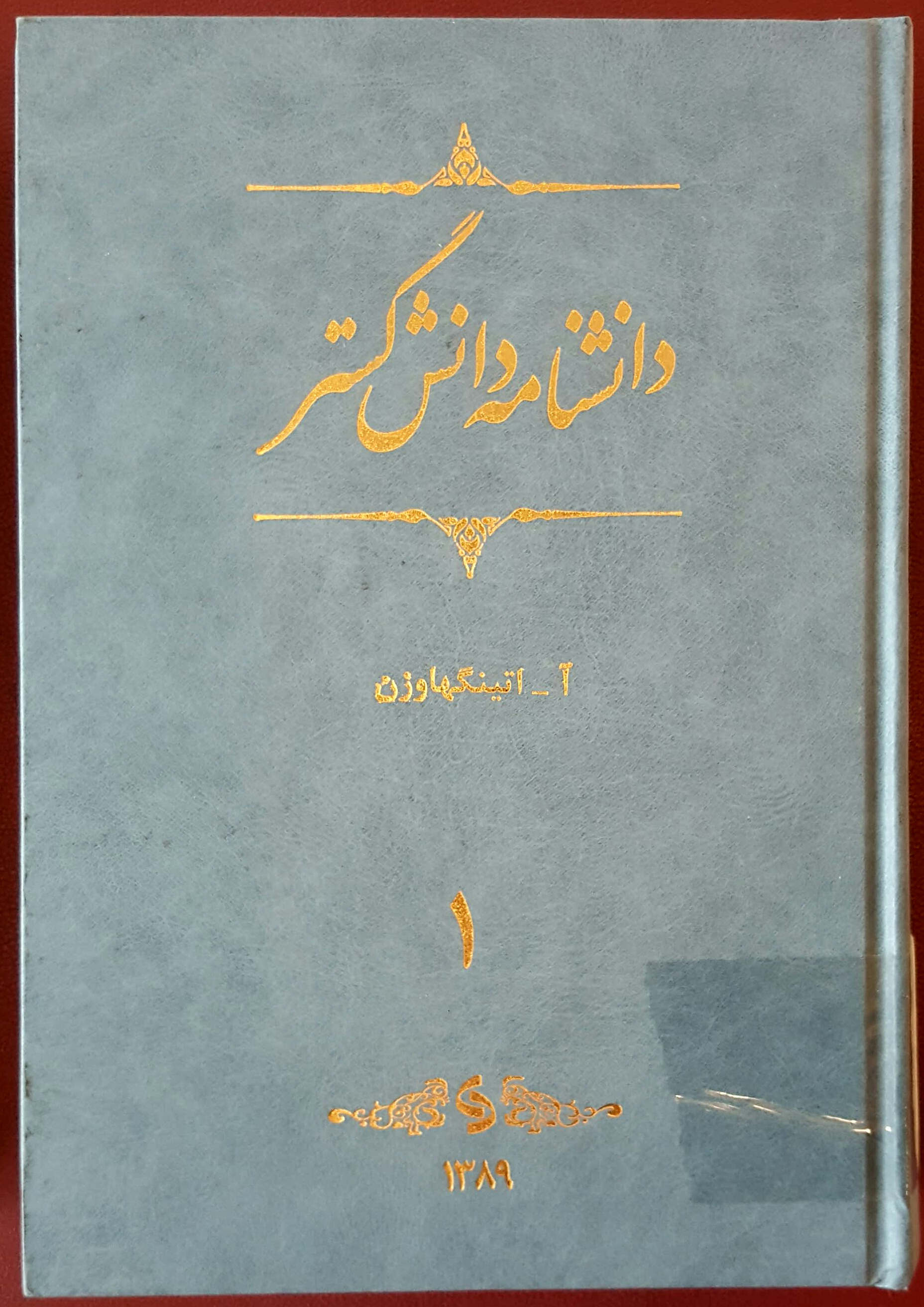 دانش‌نامه‌ی دانش‌گستر در تالار مرجع کتابخانه‌ی فرهنگستان زبان و ادب فارسی